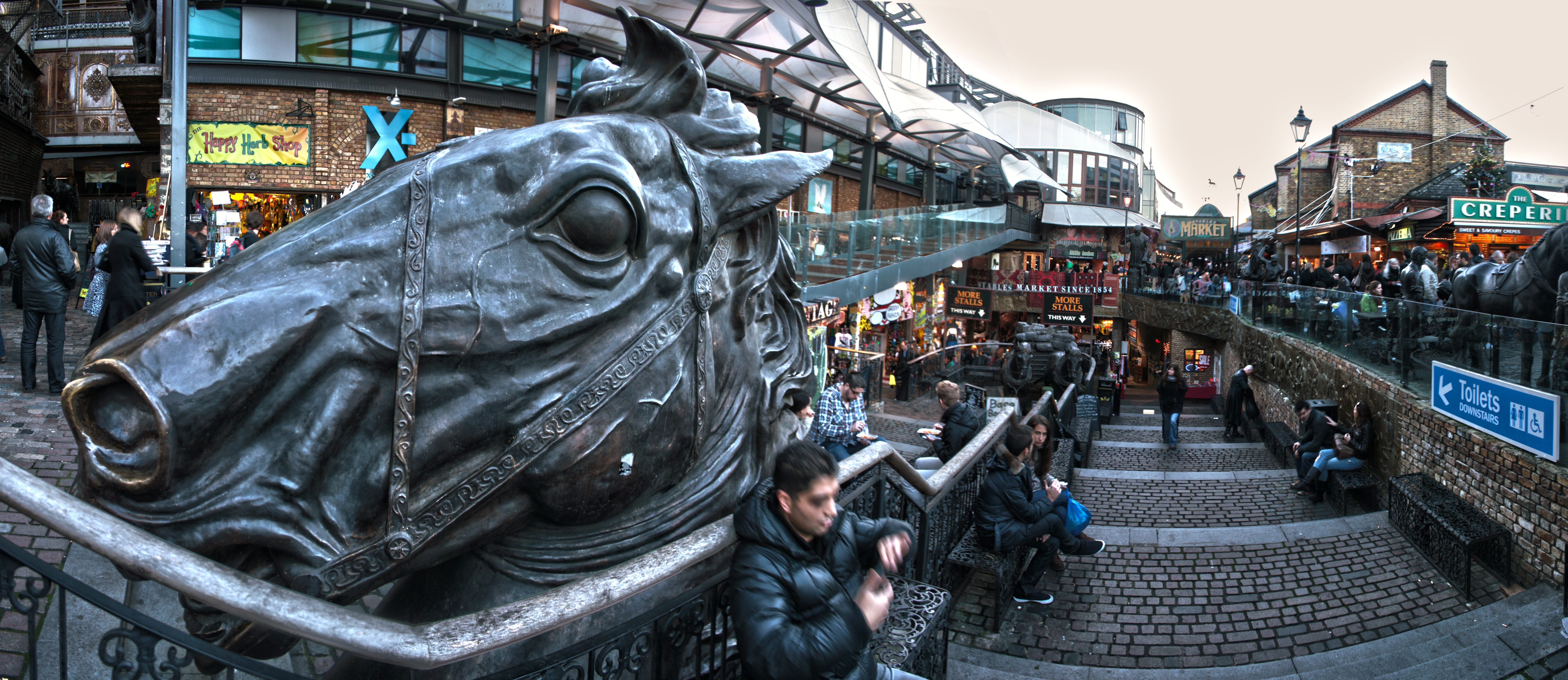 Stables Market